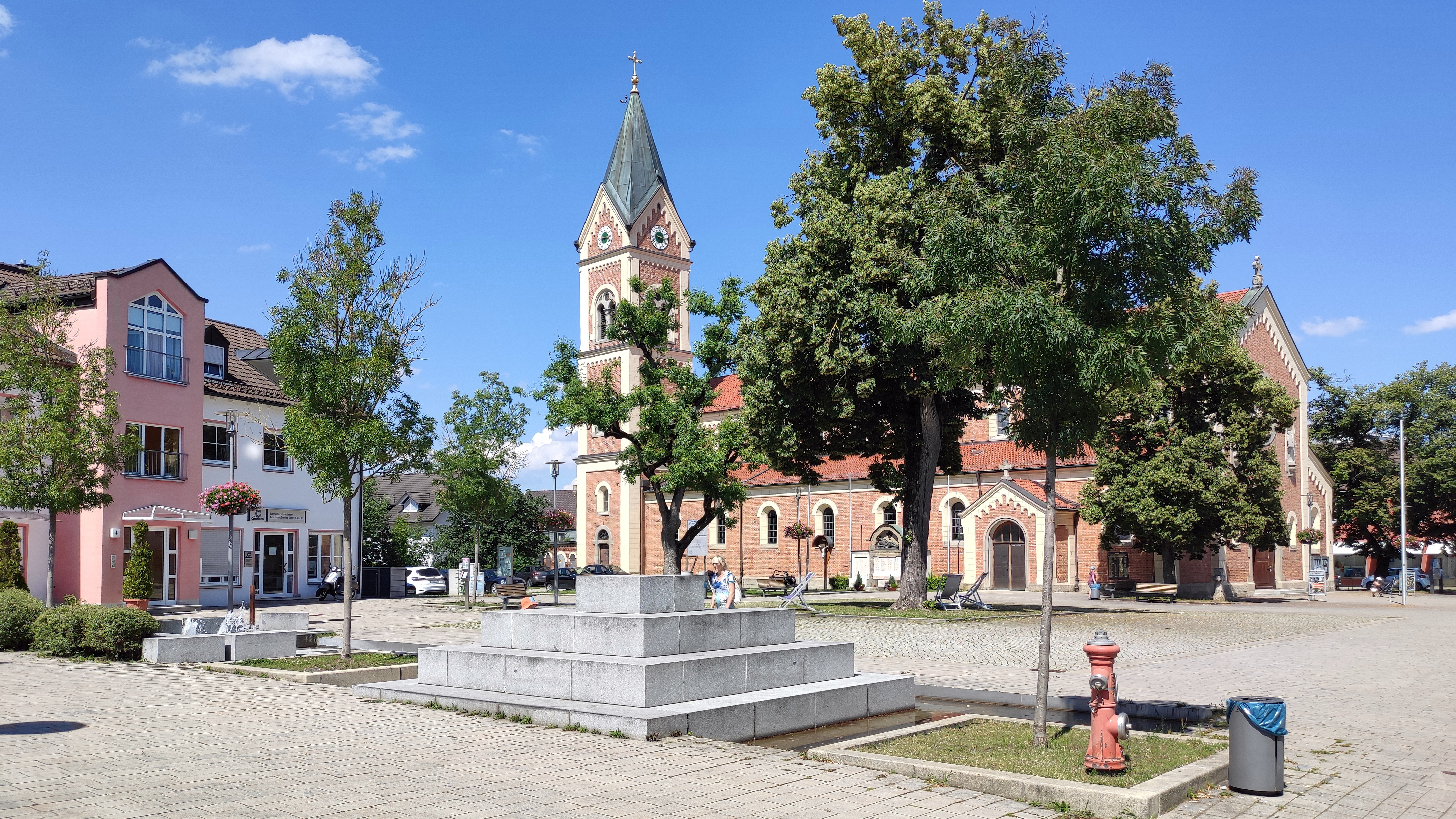 Die römisch-katholische Pfarrkirche St. Peter und Paul in der Stadt Olching ist eine neoromanische Basilika, die 1901 für die stark wachsende Dorfgemeinde gebaut wurde.